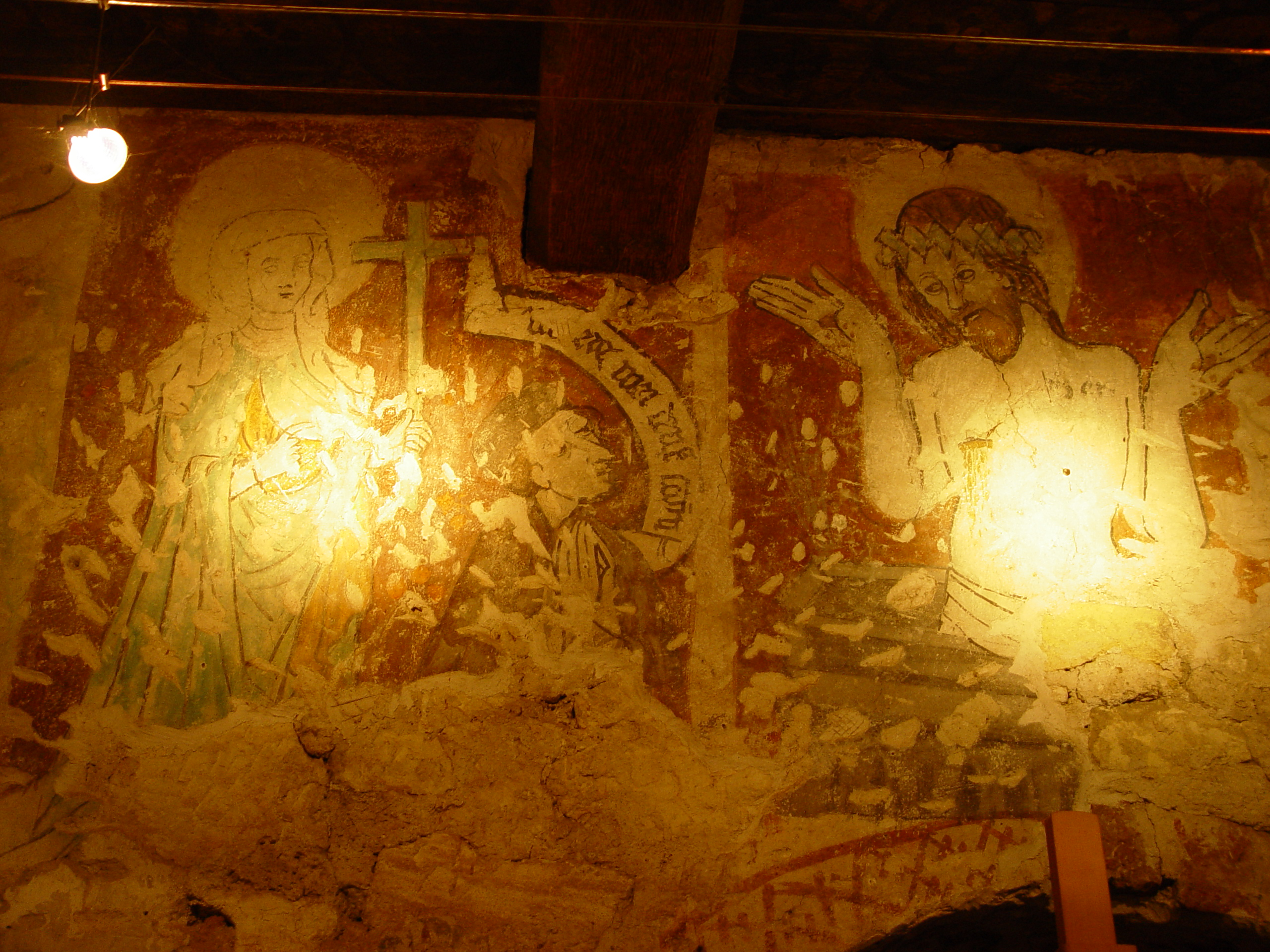 Wislica, Dom Dlugosza, Piwnice - polichromia z postacią Jana Długosza (geolokalizacja